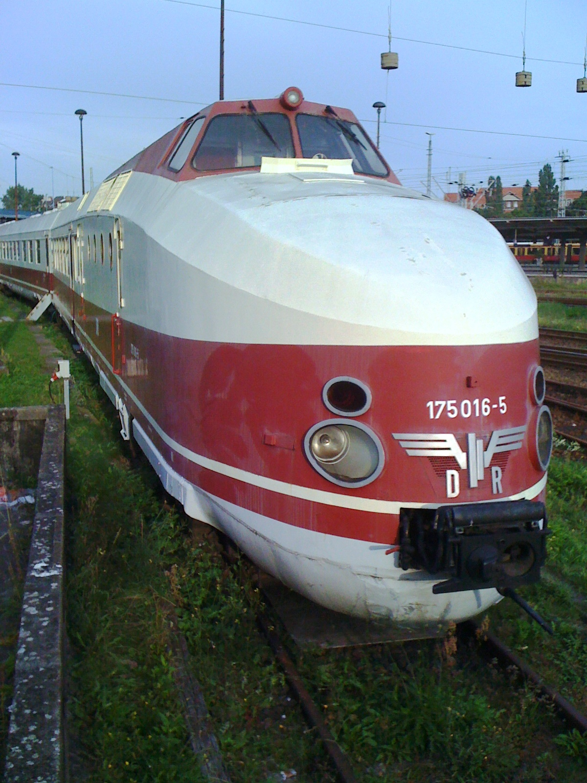 Bahnhof Berlin Lichtenberg, Zug 175 016-5, dieselhydraulischer Schnelltriebzug (SVT) der ehemaligen Deutschen Reichsbahn der DDR